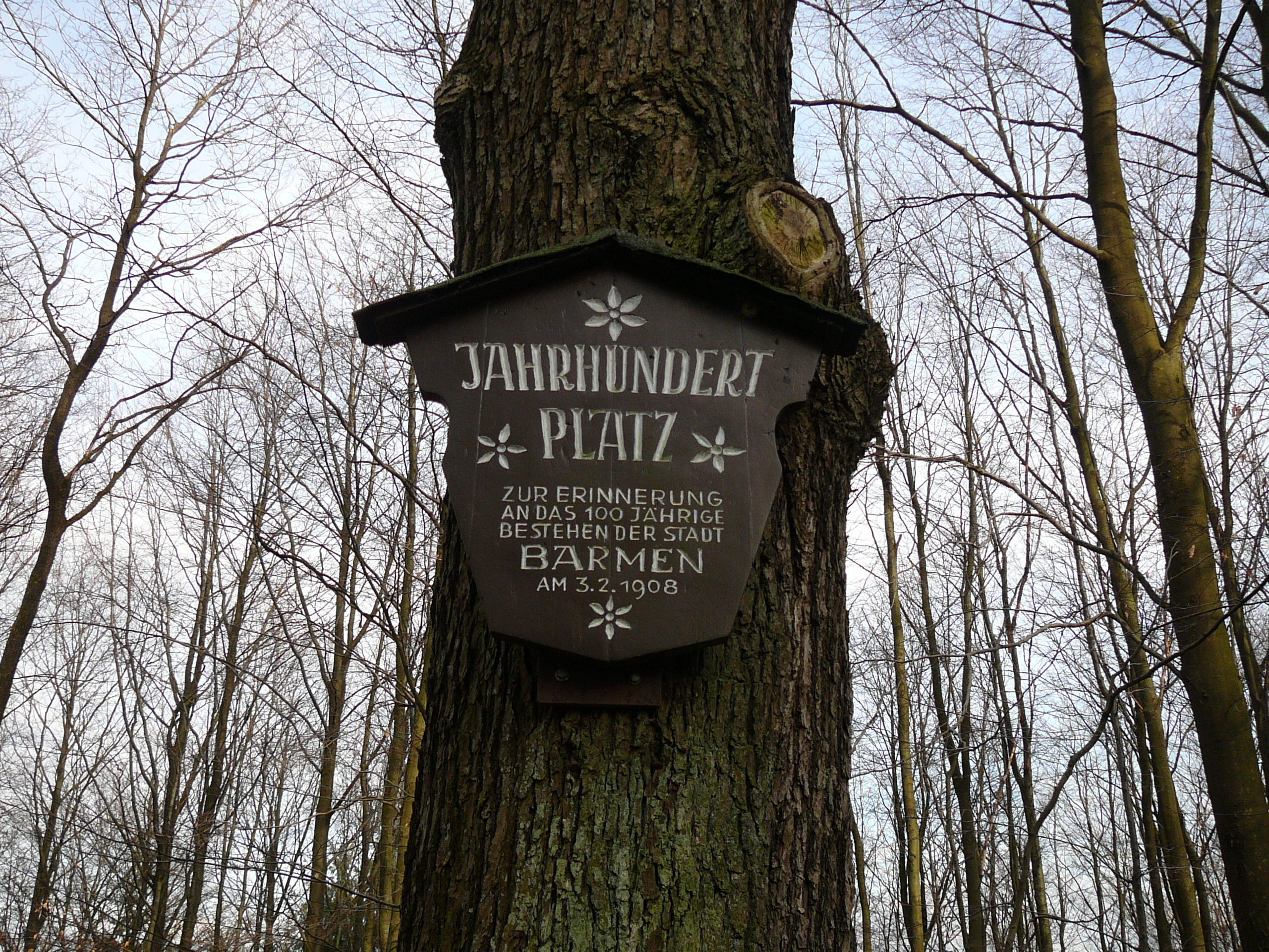 Barmer Wald, Wuppertal